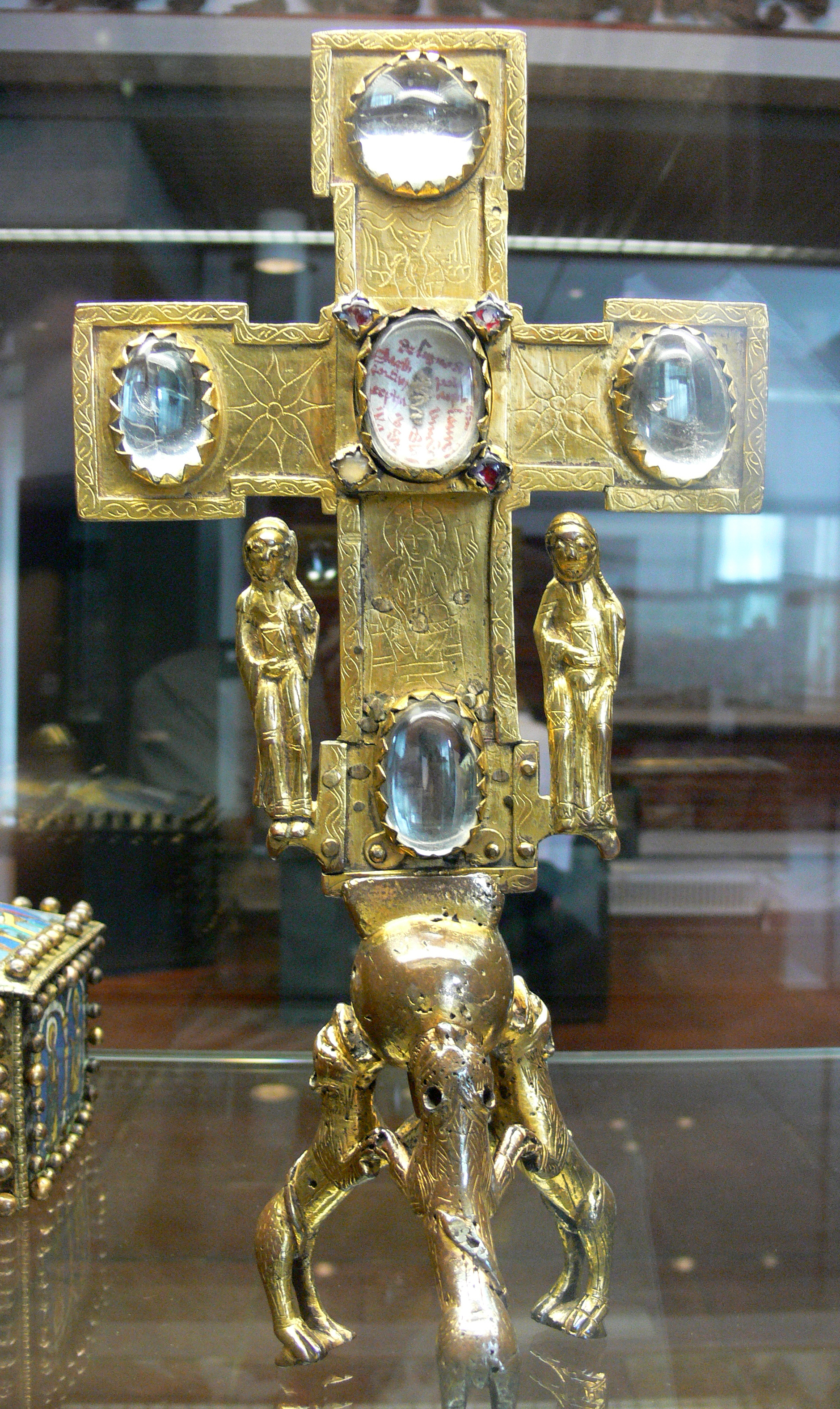 Reliquienkreuz; Bronze, vergoldet, Bergkristall; Niedersachsen (Braunschweig?), 1. Viertel 12. Jh. Kunstgewerbemuseum Berlin; Inv. Nr. W 10